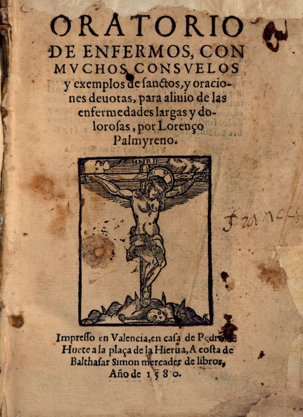 Portada de l'obra "Oratorio de enfermos : con muchos consuelos y exemplos de sanctos, y oraciones deuotas, para aliuio de las enfermedades largas y dolorosas" (1580) de Juan Lorenzo Palmireno. Impresso en Valencia : en casa de Pedro de Huete, 1580.